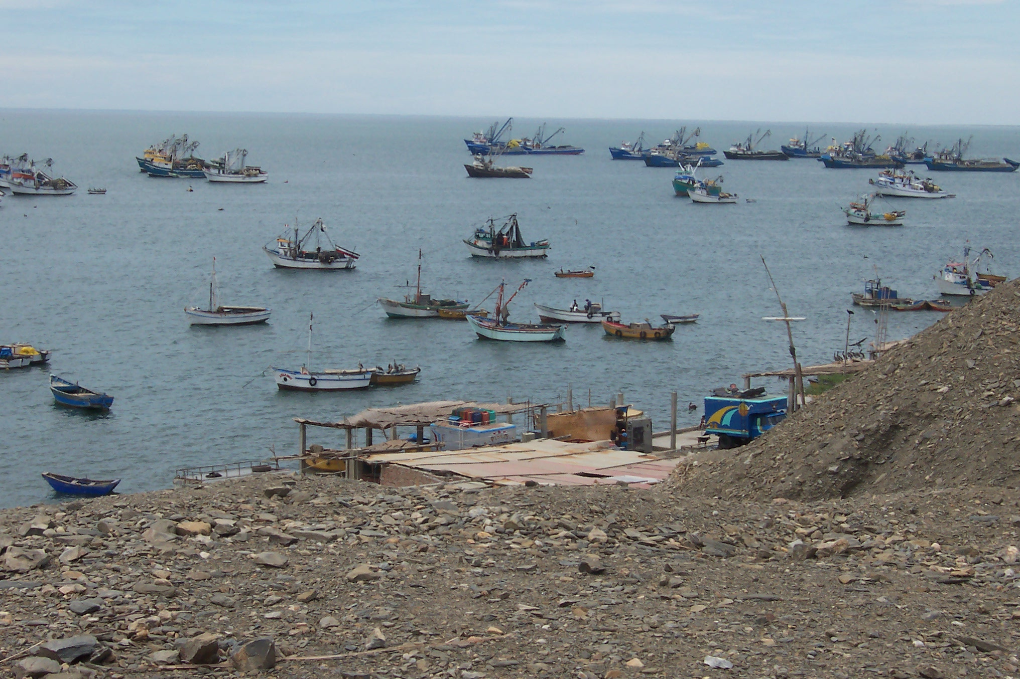 Barcos de pesca artesanal (1) Lugar: Puerto de pesca artesanal de Bayovar en el desierto del mismo nombre Autor: Alfredobi Fecha: Marzo 2006